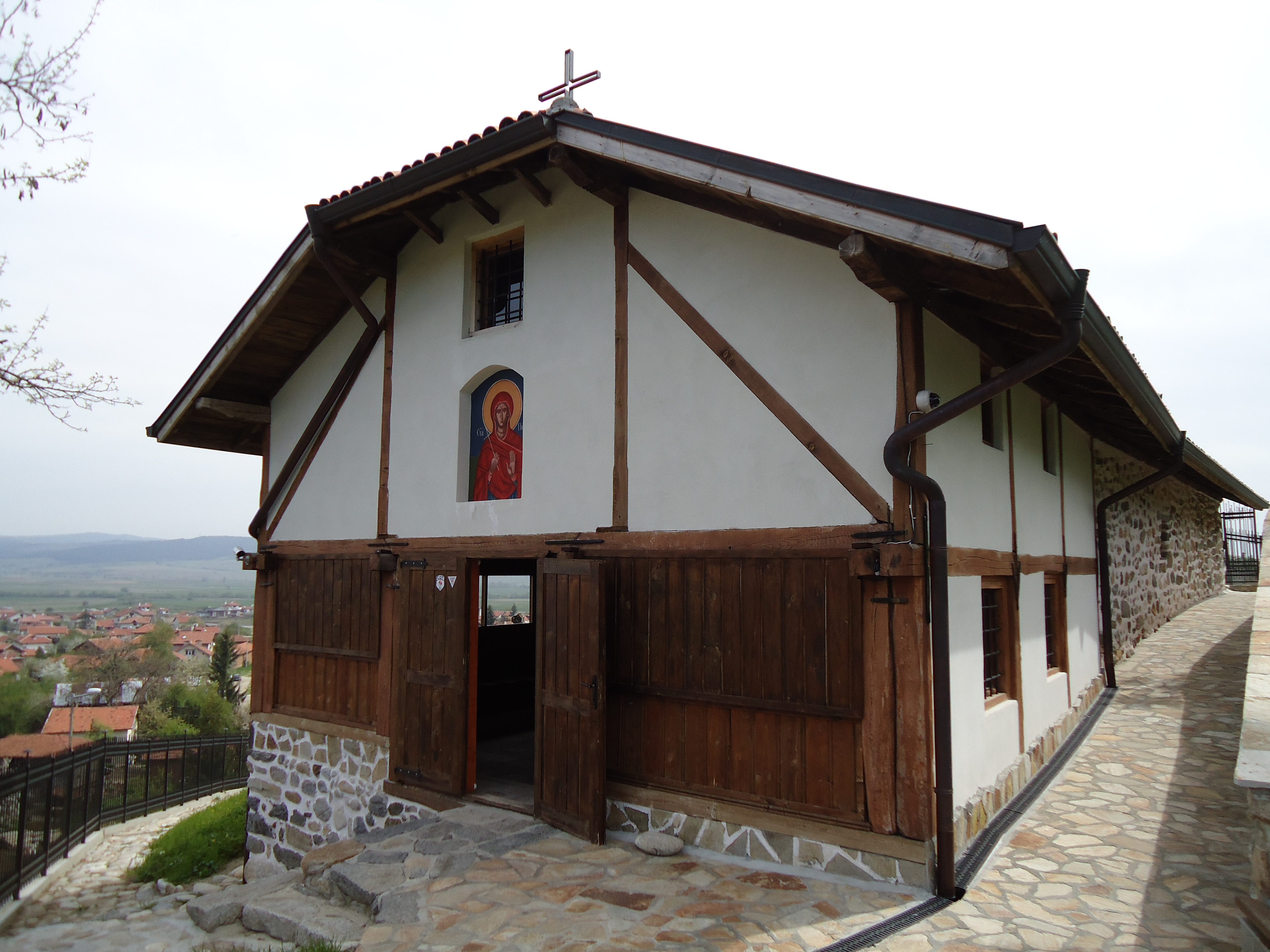 Църква Света Петка - с.Белчин ХVІІ в.